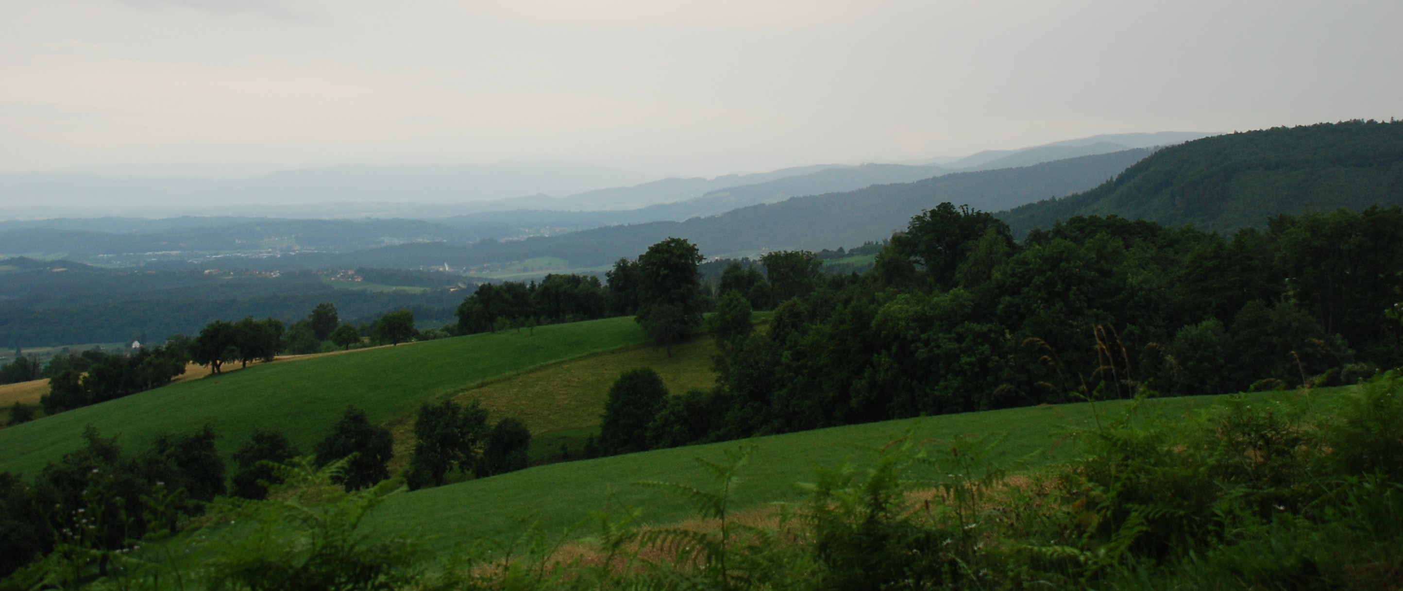 Höhenzüge der Koralm tauchen bei Deutschlandsberg in das Grazer Becken ab, vom Gamsgebirg aus, Vordergrund Greimkogel